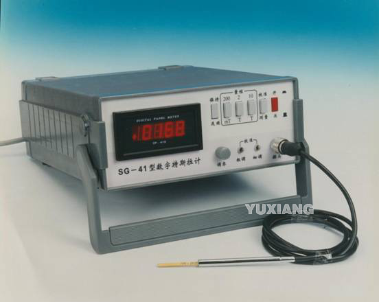 Digital teslameter